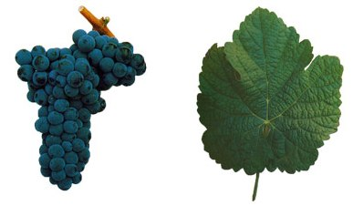 Traube und Blatt der Rotweinsorte 'Touriga_Franca'